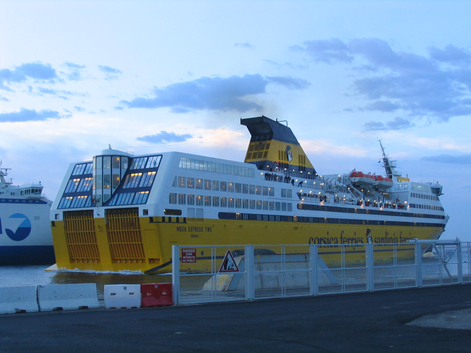 Ferienfoto einer Corsica Ferries Fähre im Hafen von Bastia